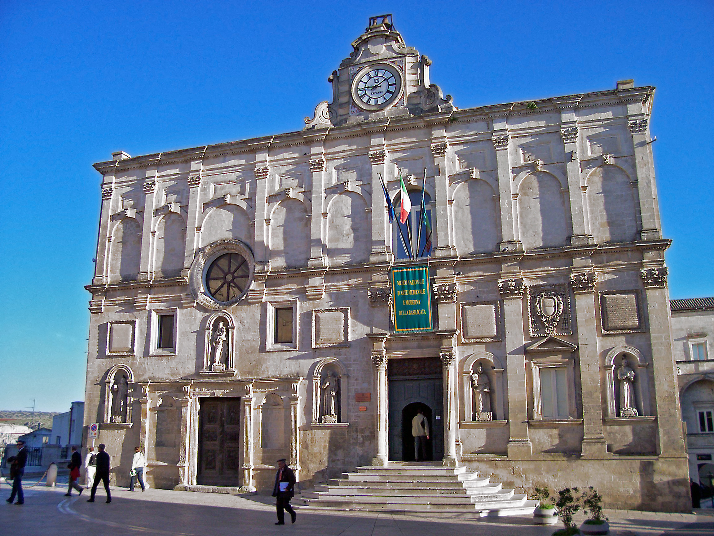 Palazzo Lanfranchi This is a photo of a monument which is part of cultural heritage of Italy.